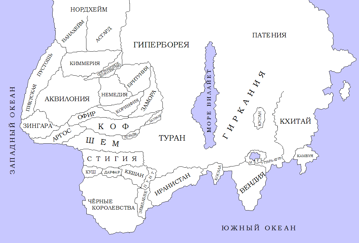 Туранский материк в Хайборийскую эру